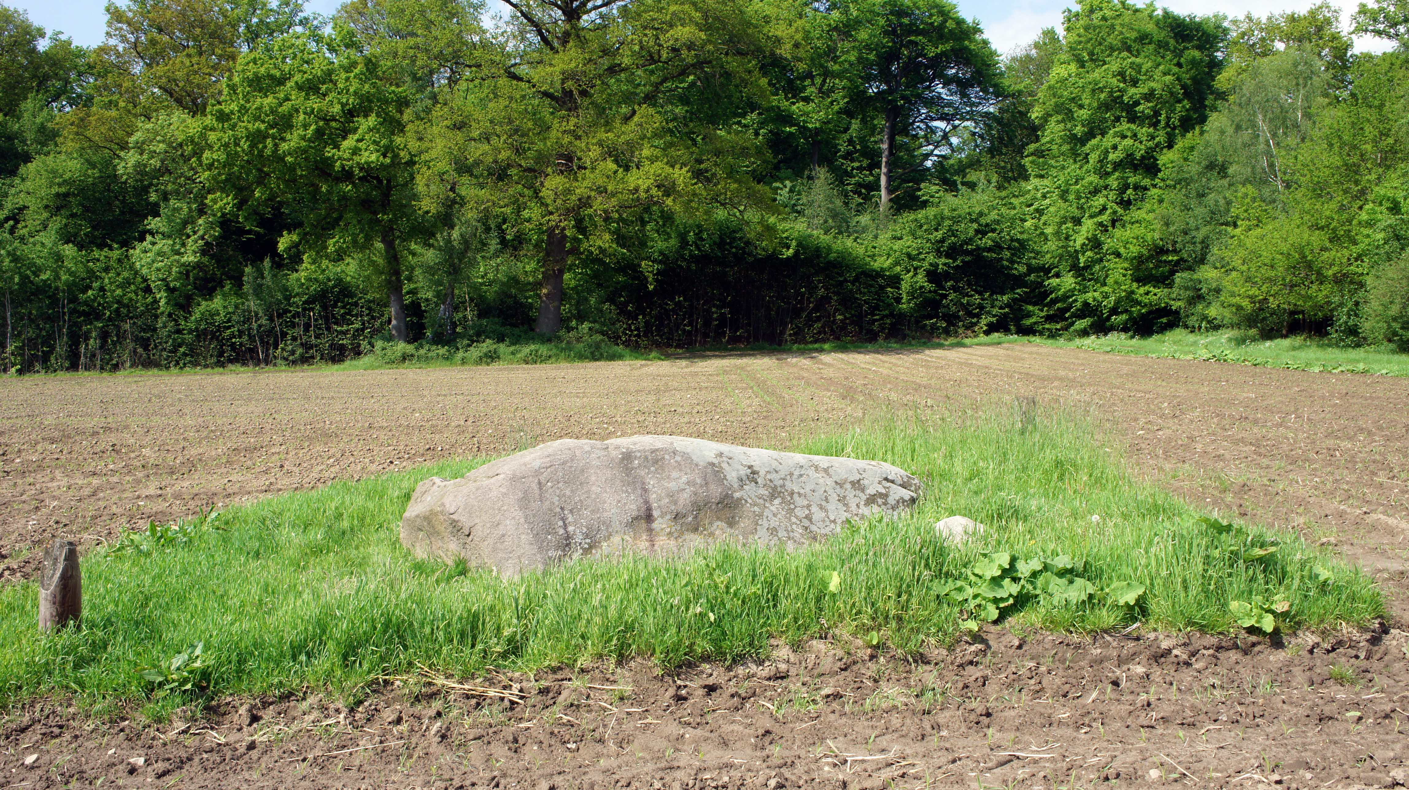 ND102 Hexenstein nördlich bei Neerstedt